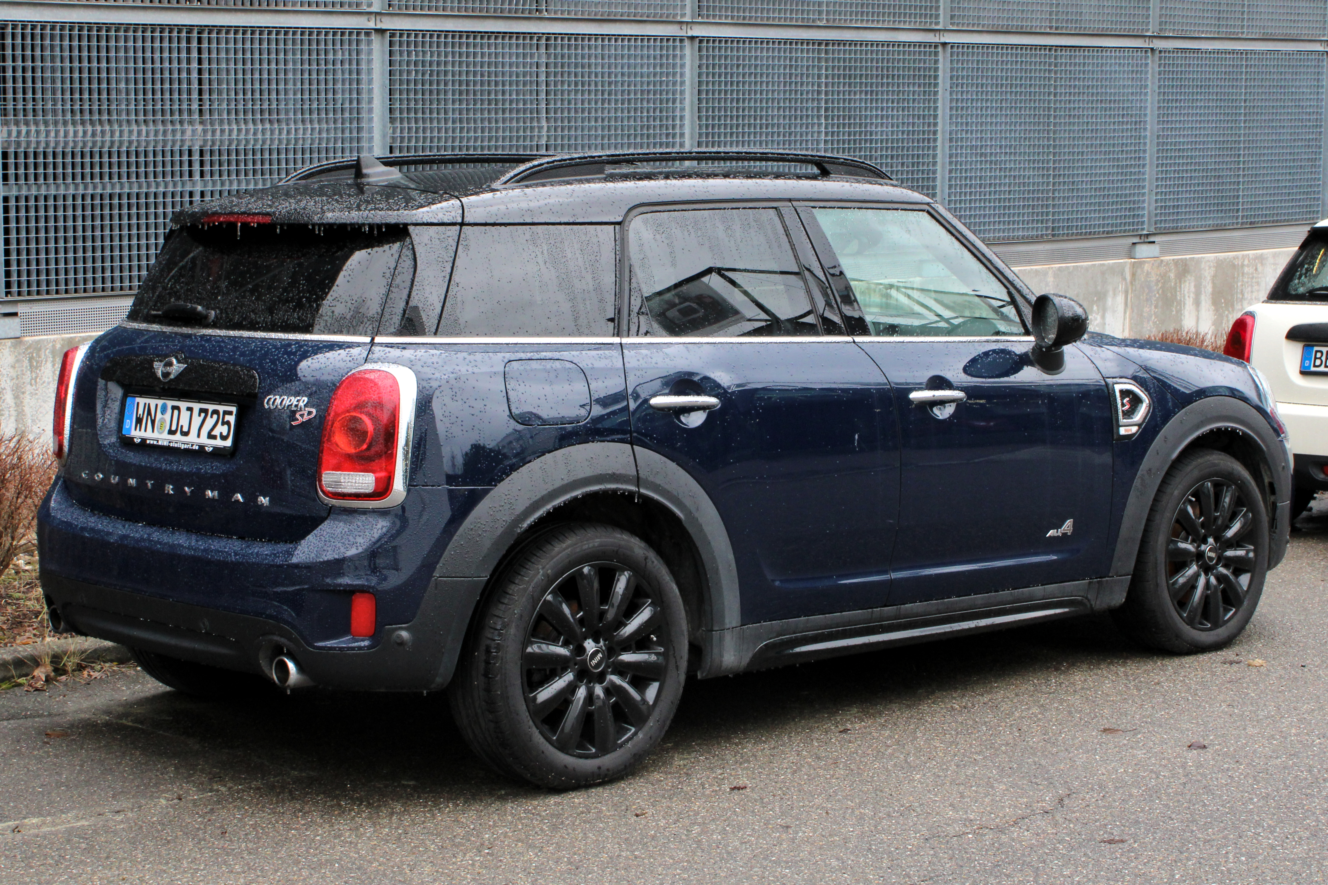 Mini Countryman Cooper SD in Stuttgart-Vaihingen